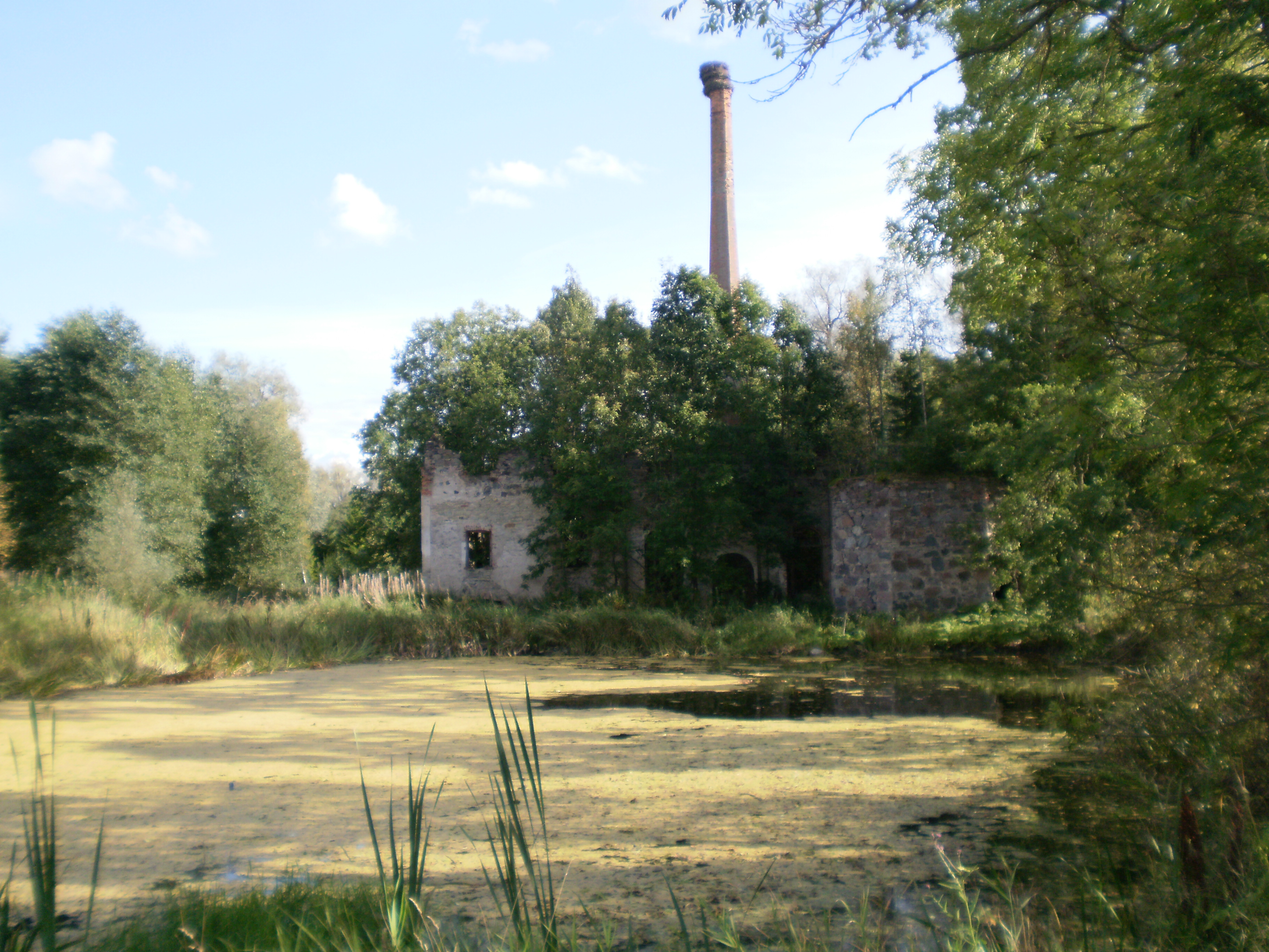 Põlula mõisa piiritusetehas